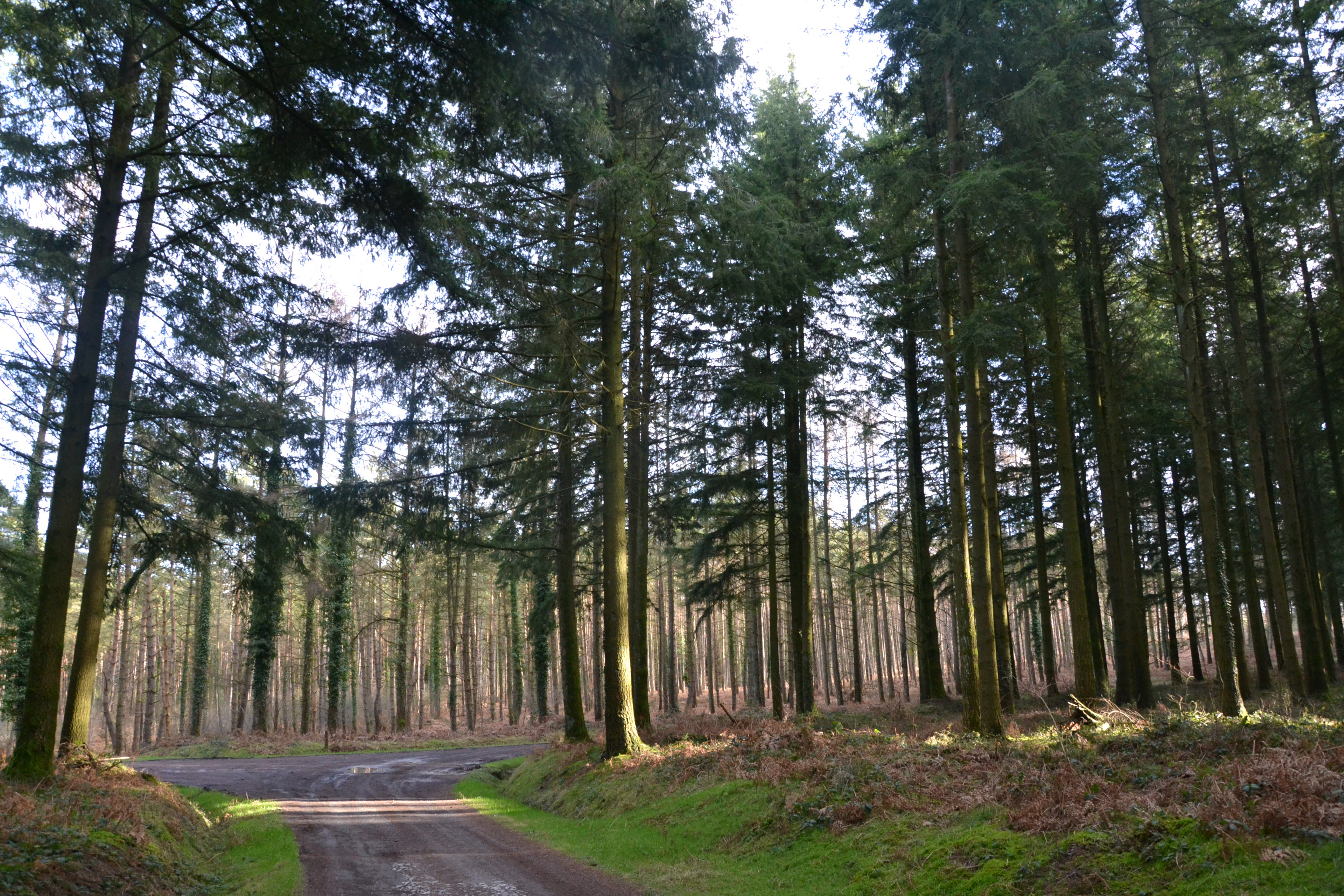 Forêt de conifères sur le Maupuy, dans les monts de Guéret.